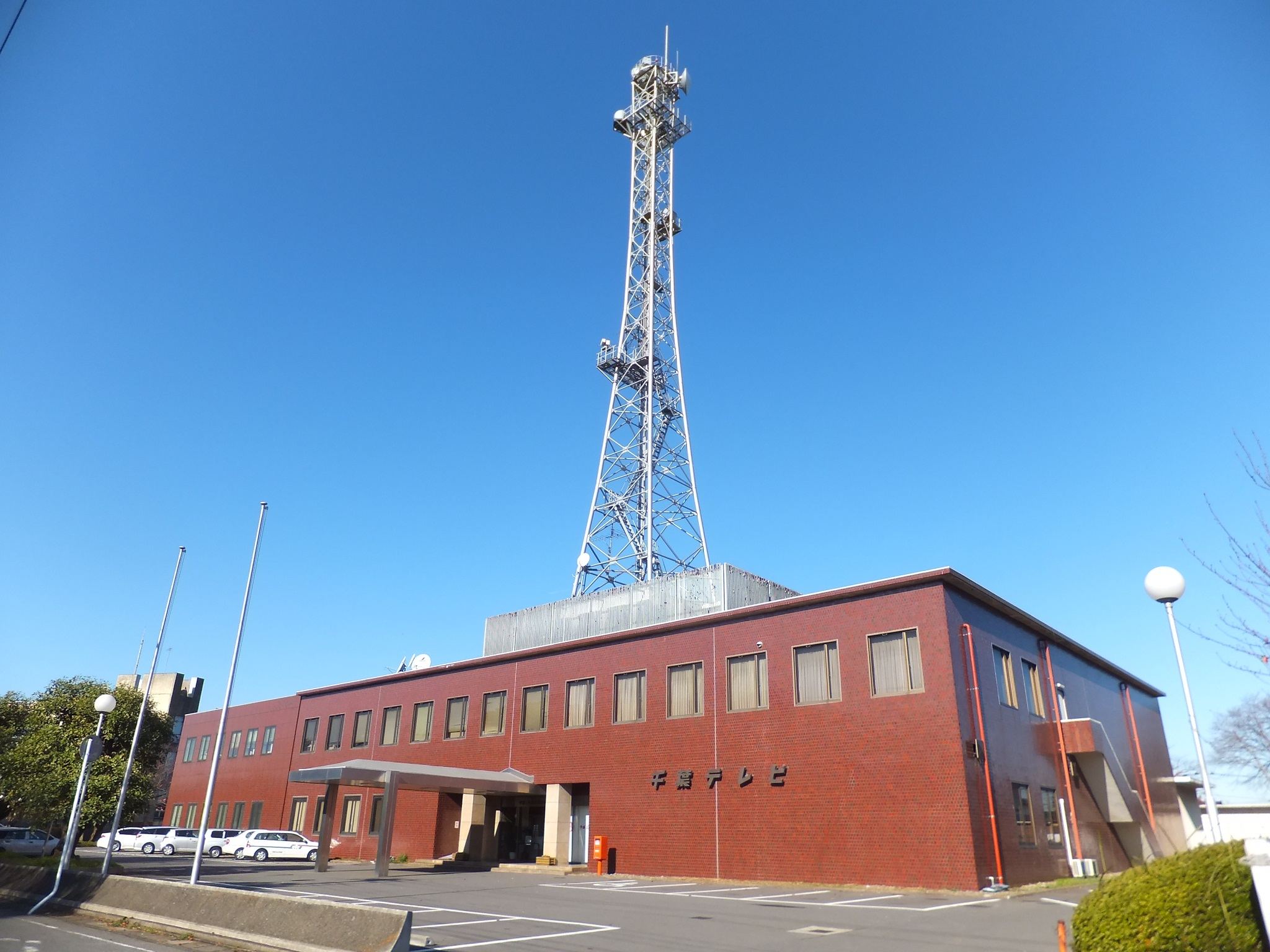 千葉テレビ放送本社